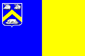 Vlag van de gemeente Essen